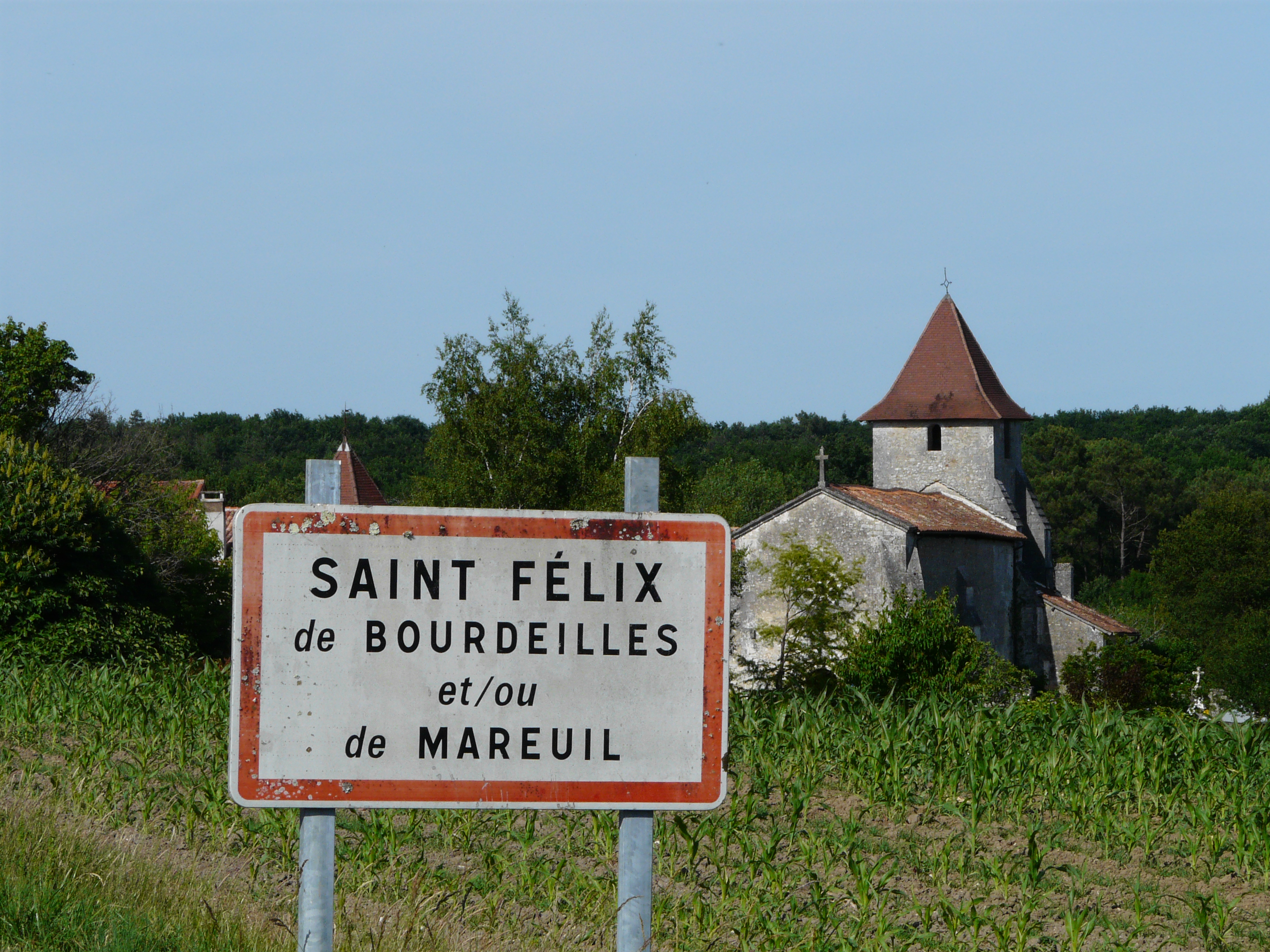 Panneau d'entrée dans le village, Saint-Félix-de-Bourdeilles, Dordogne, France.